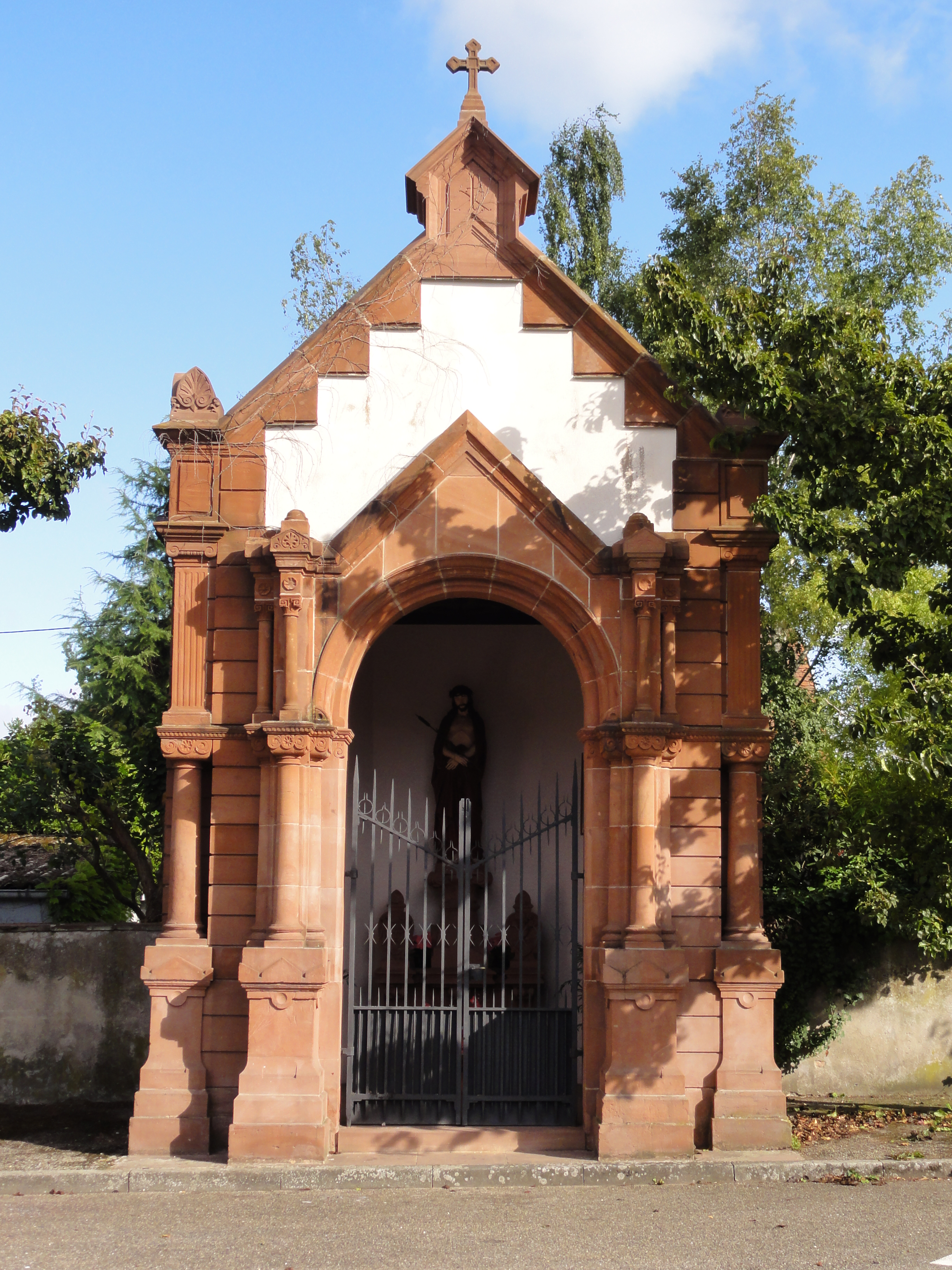 Alsace, Bas-Rhin, Marienthal, Chapelle du Cimetière, puis Chapelle du Parking (XIXe). .